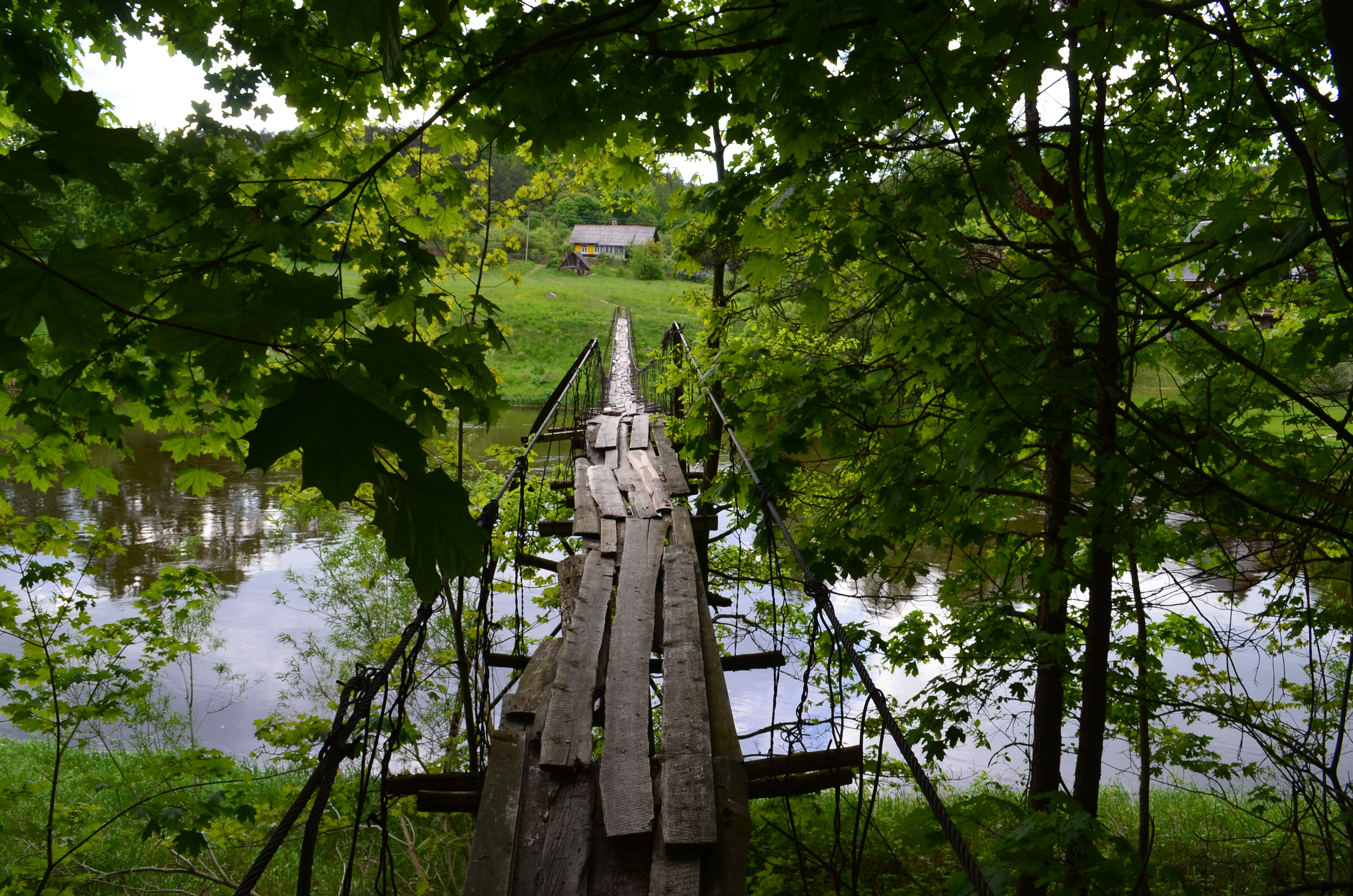 Tiltas per Nerį tarp Liucionių ir Papunės (Skersabalių), Vilniaus raj.